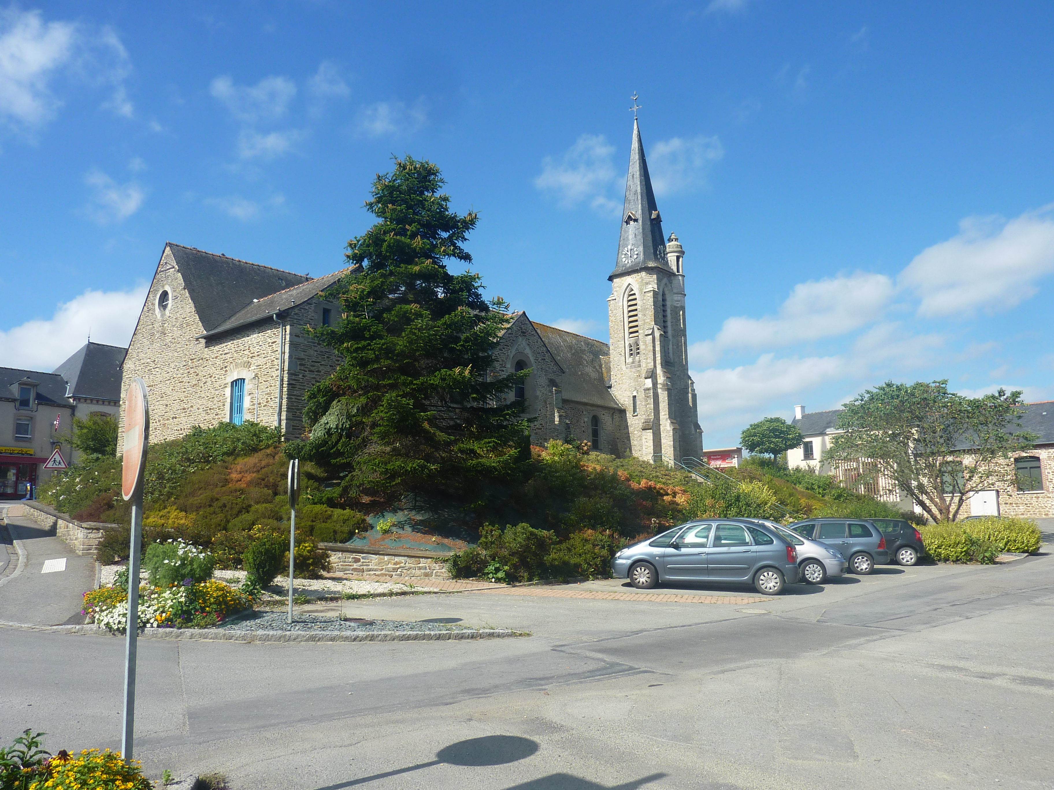 Saint-Didier : l'église paroissiale vue depuis le bas du bourg (côté nord-est). On voit le reste de la butte entourant l'église qui portait l'ancien cimetière disparu et qui a été partiellement arasée pour faire place à un parking.